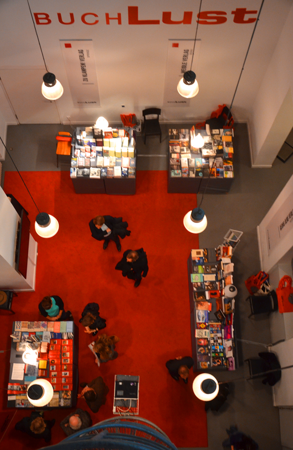 Momentaufnahme kurz vor dem Abendprogramm für die Veranstalter und Austeller am ersten Tag der Buchmesse Buchlust 2016, die am 19. und 20. November unter dem Motto Ausstellung und Lesungen wieder 24 unabhängigen Verlagen im Künstlerhaus der niedersächsischen Landeshauptstadt Hannover eine Bühne für die Öffentlichkeit bietet (Eintritt 4,-- Euro) ...